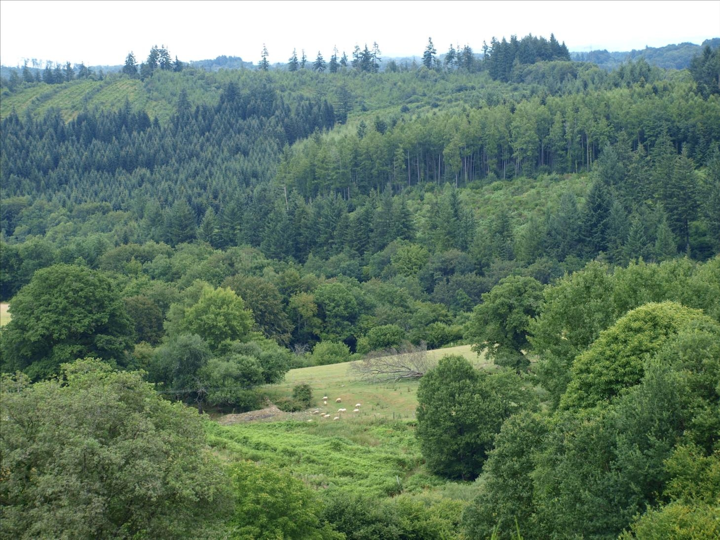 Paysage près du Thaurion, à proximité du village du Masginier, commune de Châtelus-le-Marcheix, Creuse, Limousin.